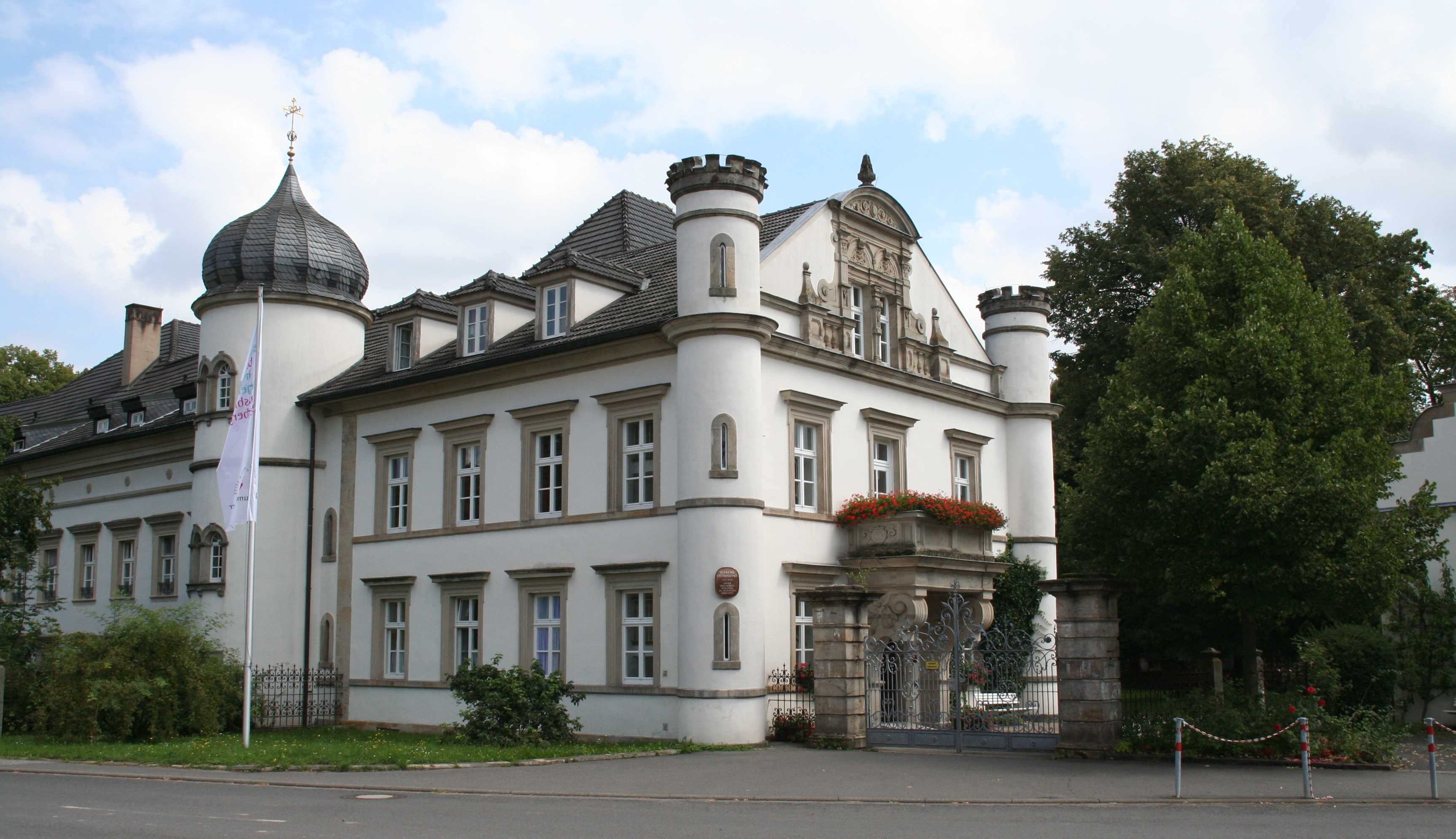 Schloss in Ditterswind, Teil der Gemeinde Maroldsweisach im Landkreis Haßberge in Bayern